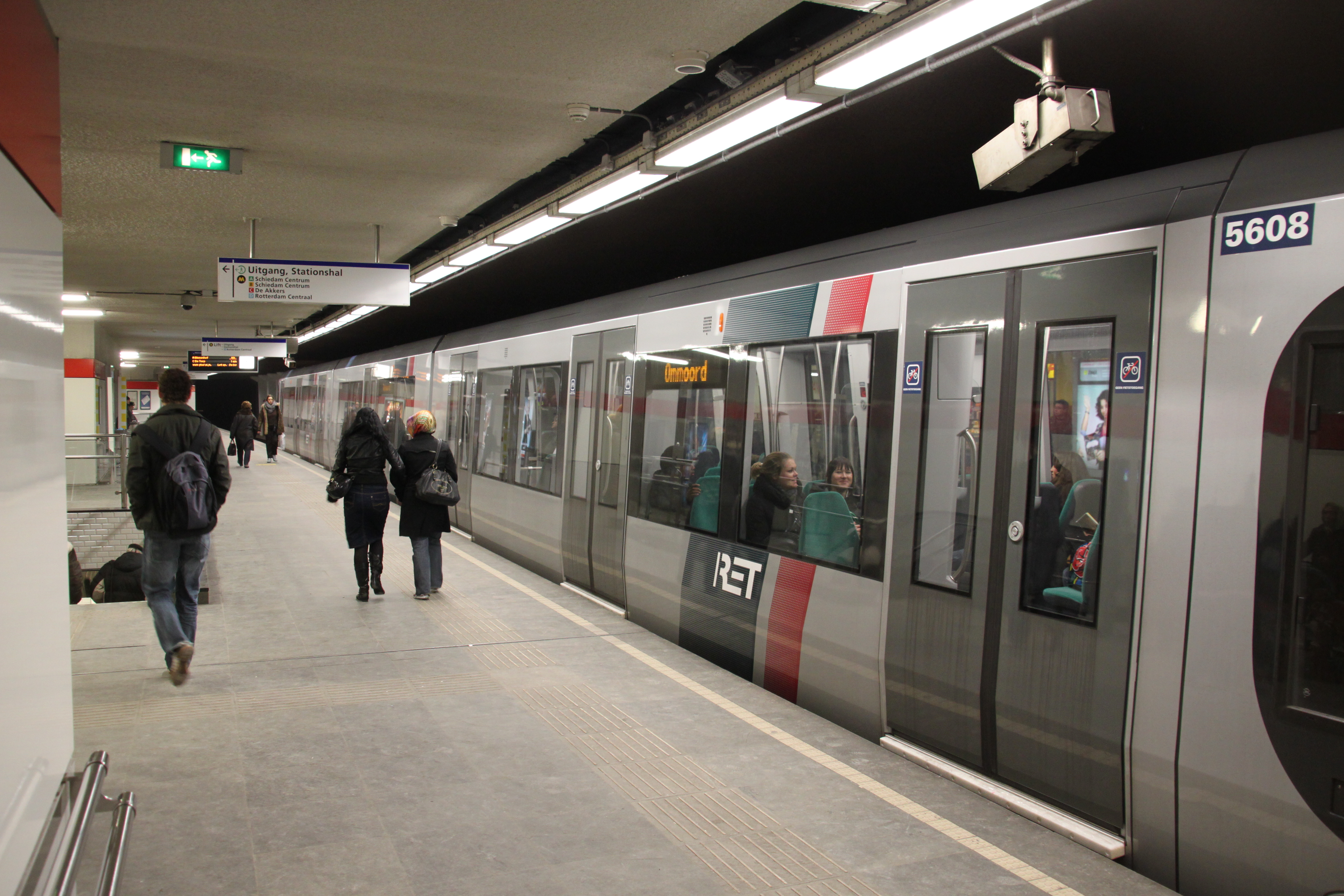 RET 5600